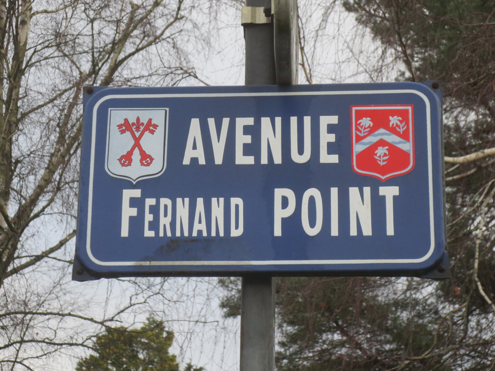 Avenue Fernand Point à Beaune